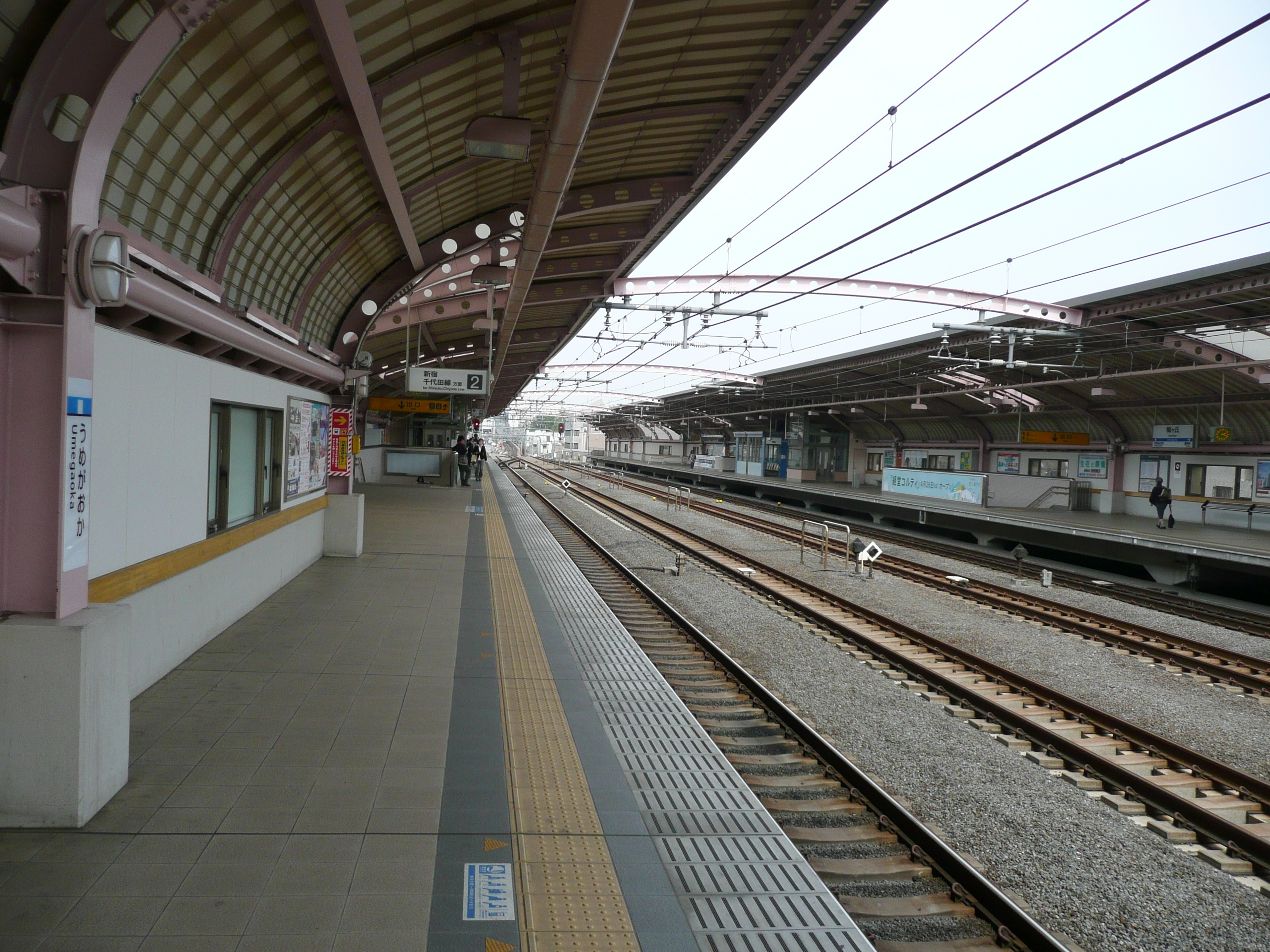 梅ヶ丘駅ホーム